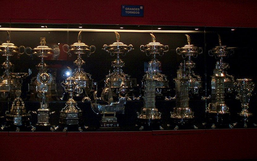 Vitrina de grandes trofeos amistosos en el Museo del Club Atlético de Madrid.